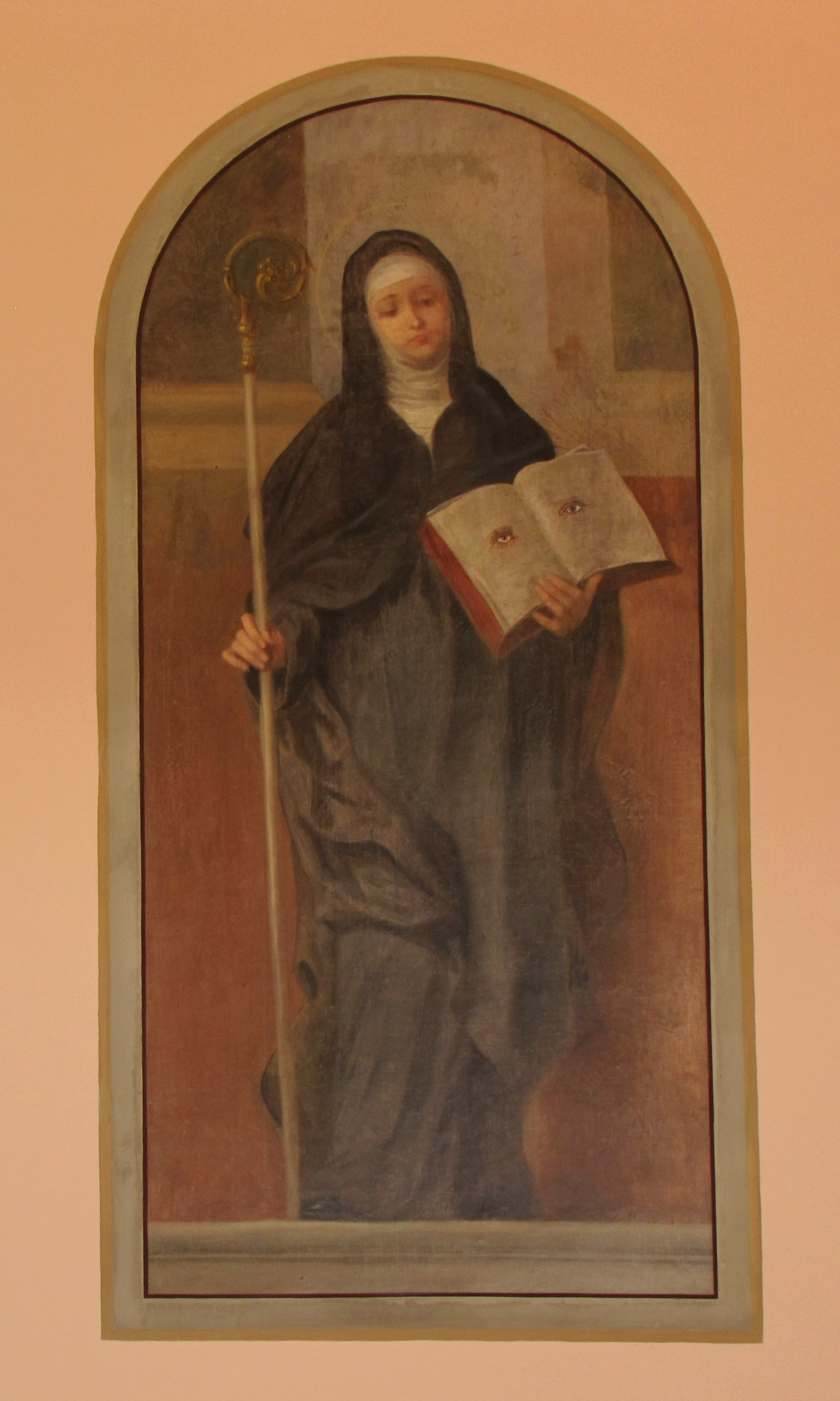 Alsace, Bas-Rhin, Église St Kilian de Dingsheim (IA67005517). Tableau "Ste Odile" (Inconnu, 300cm de haut, XIXe)